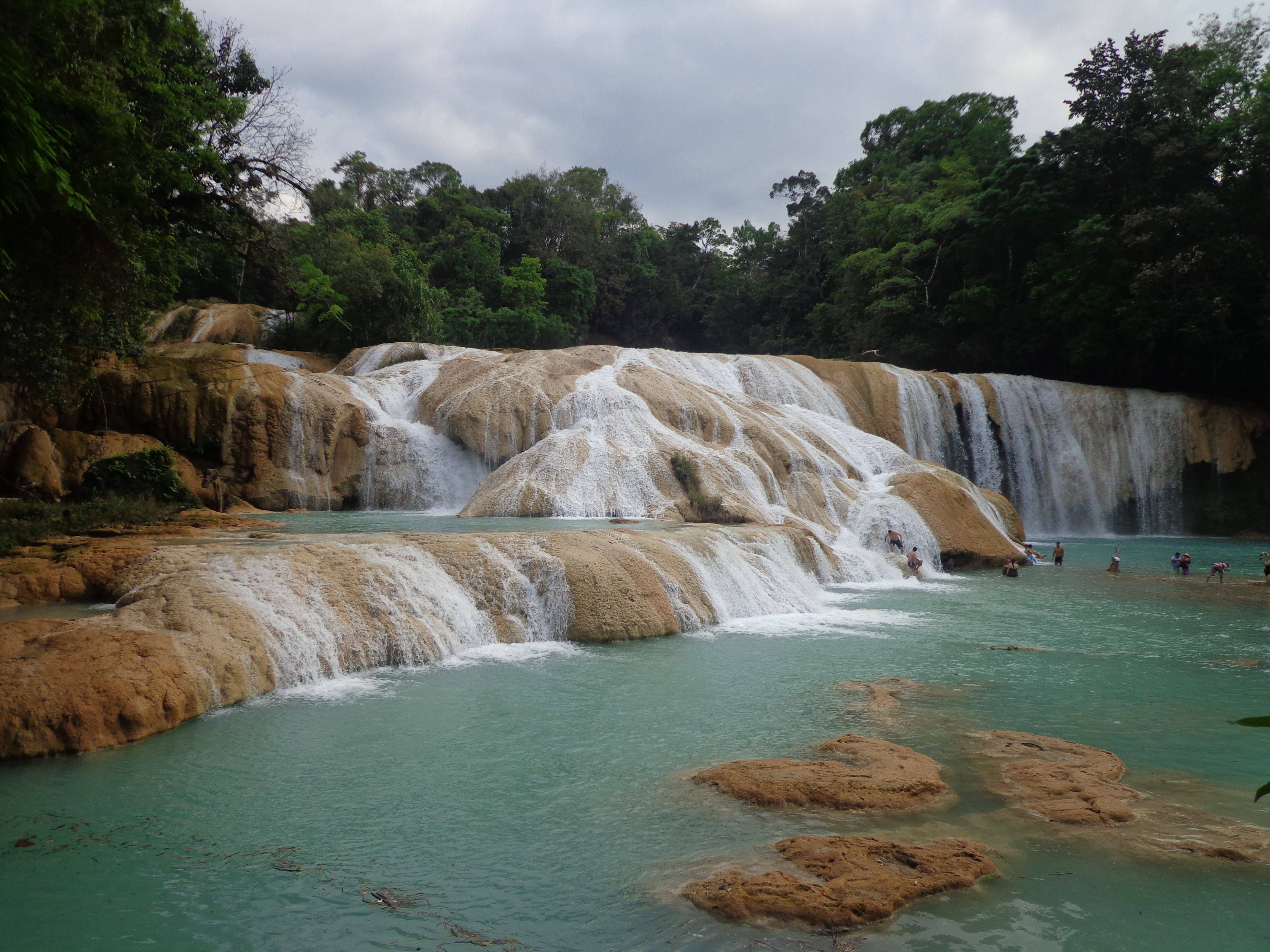 Cascada 1 de Agua Azul desde el puente